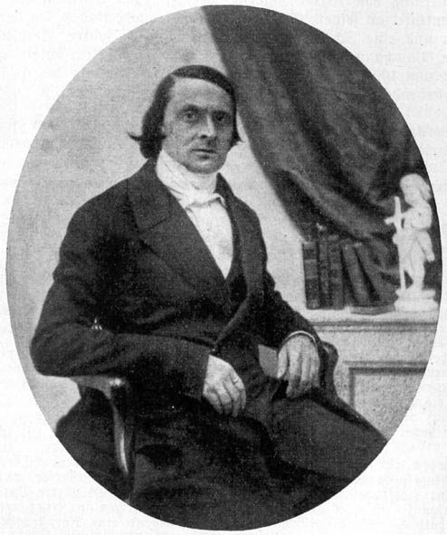 Franz Xaver Remling Domkapitular Speyer